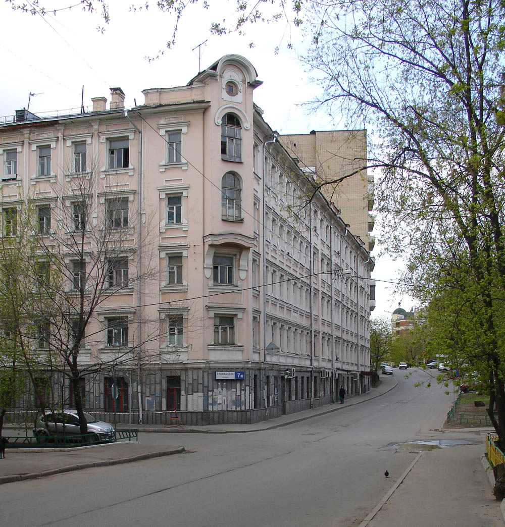 7, Klimashkina Street, Moscow. This is the earliest extant house built by Ernst Nirnsee (for his brother, Karl) in 1905 and rebuilt by the same family duo in 1912. Destroyed in 2008-2009.Наиболее ранний из сохранившихся домов постройки Эрнста Нирнзее (владел домом его брат Карл). Построен в 1905 и перестроен тем же семейным дуэтом в 1912. Реконструкция в 2008-2010.